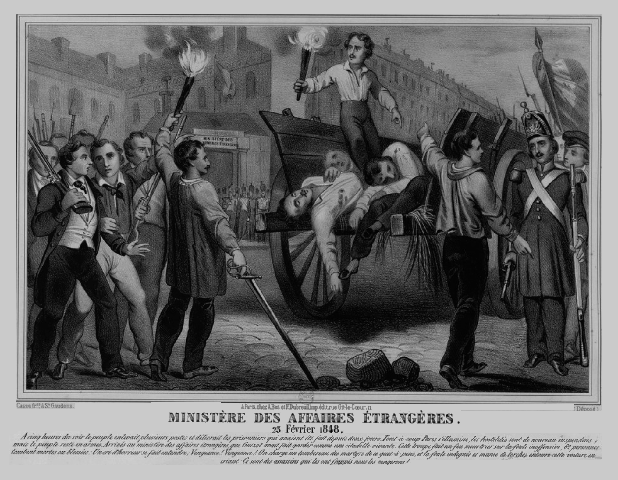 Estampes. Les révolutionnaires devant le Ministère des Affaires étrangères, 23 février 1848. Sous le titre, commentaire de quatre lignes : "A cinq heures du soir, le peuple enlevait plusieurs postes et délivrait les prisonniers qui avaient été fait [sic] depuis deux jours [...]. Arrivés au Ministère des Affaires étrangères, que Guizot avait fait garder comme une citadelle vivante [etc.]"